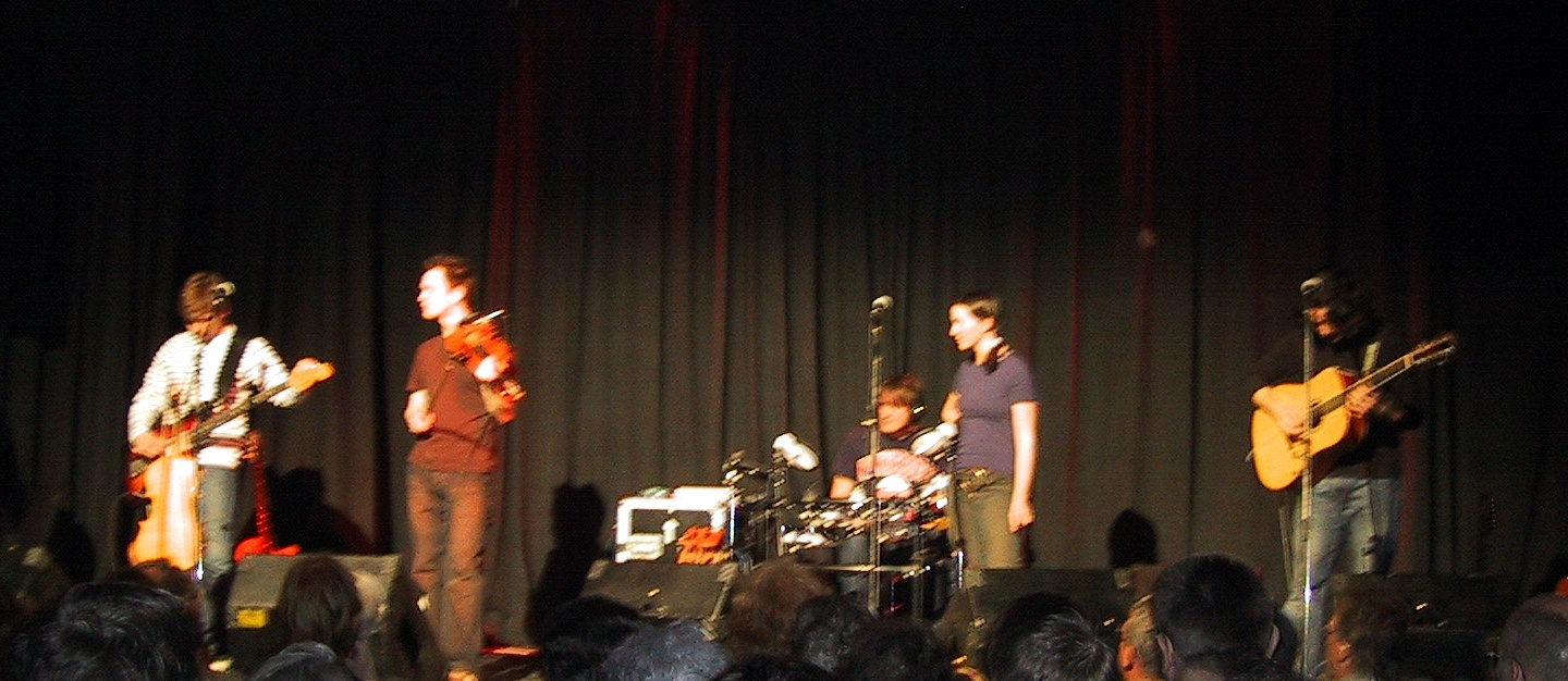 Ein Konzert der schwedischen Folk-Band GARMANA; sie tritt im Rahmen der Matinee der Liedersänger vom WDR 5 im Bahnhof Langendreer auf A concert of the swedish Band Garmana Date: 17 March 2002, Bochum, Germany Author: Maschinenjunge Licence: cc-by-sa-2.5